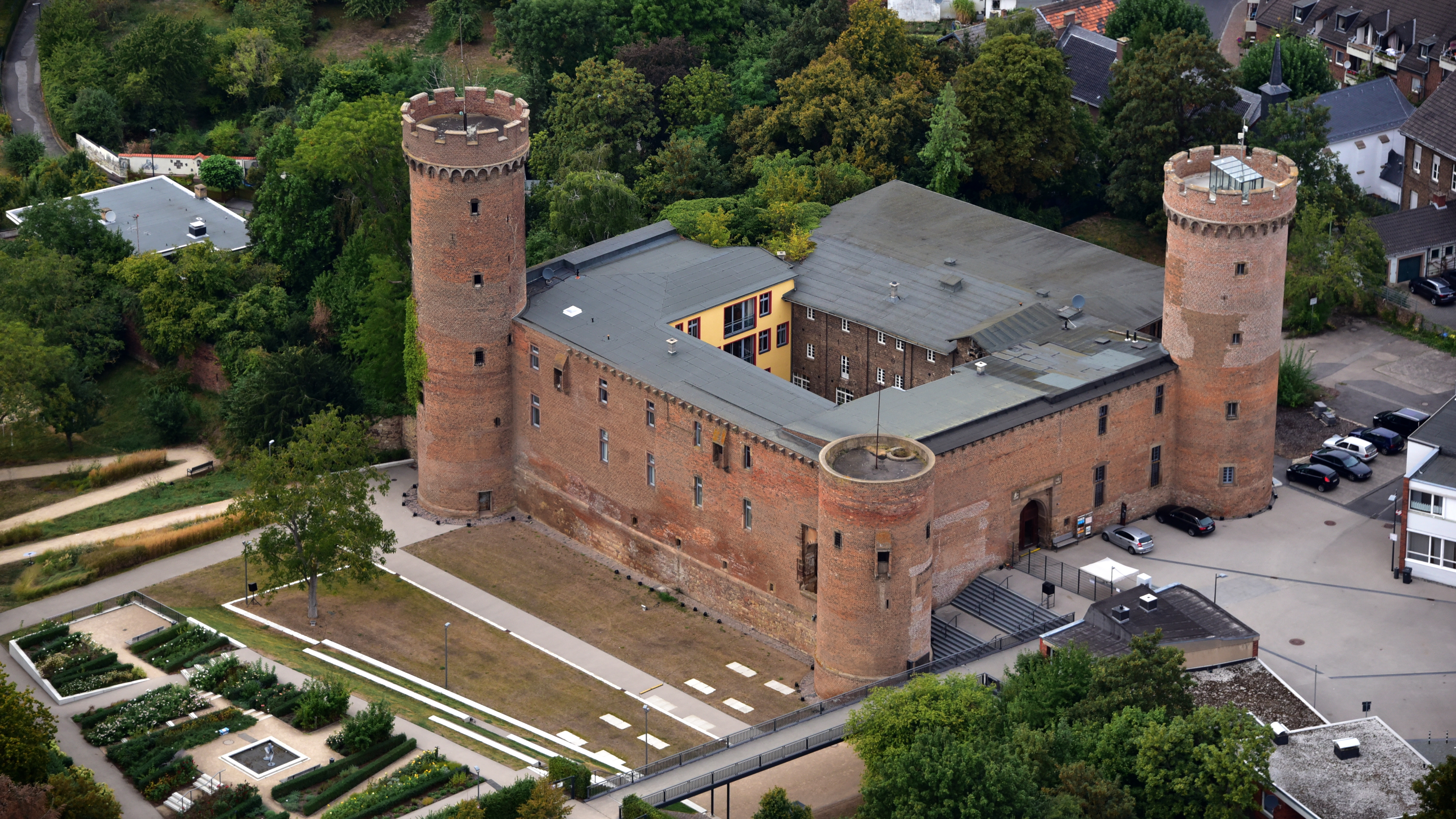 Kurkölnische Landesburg Zülpich, Luftaufnahme (2016)